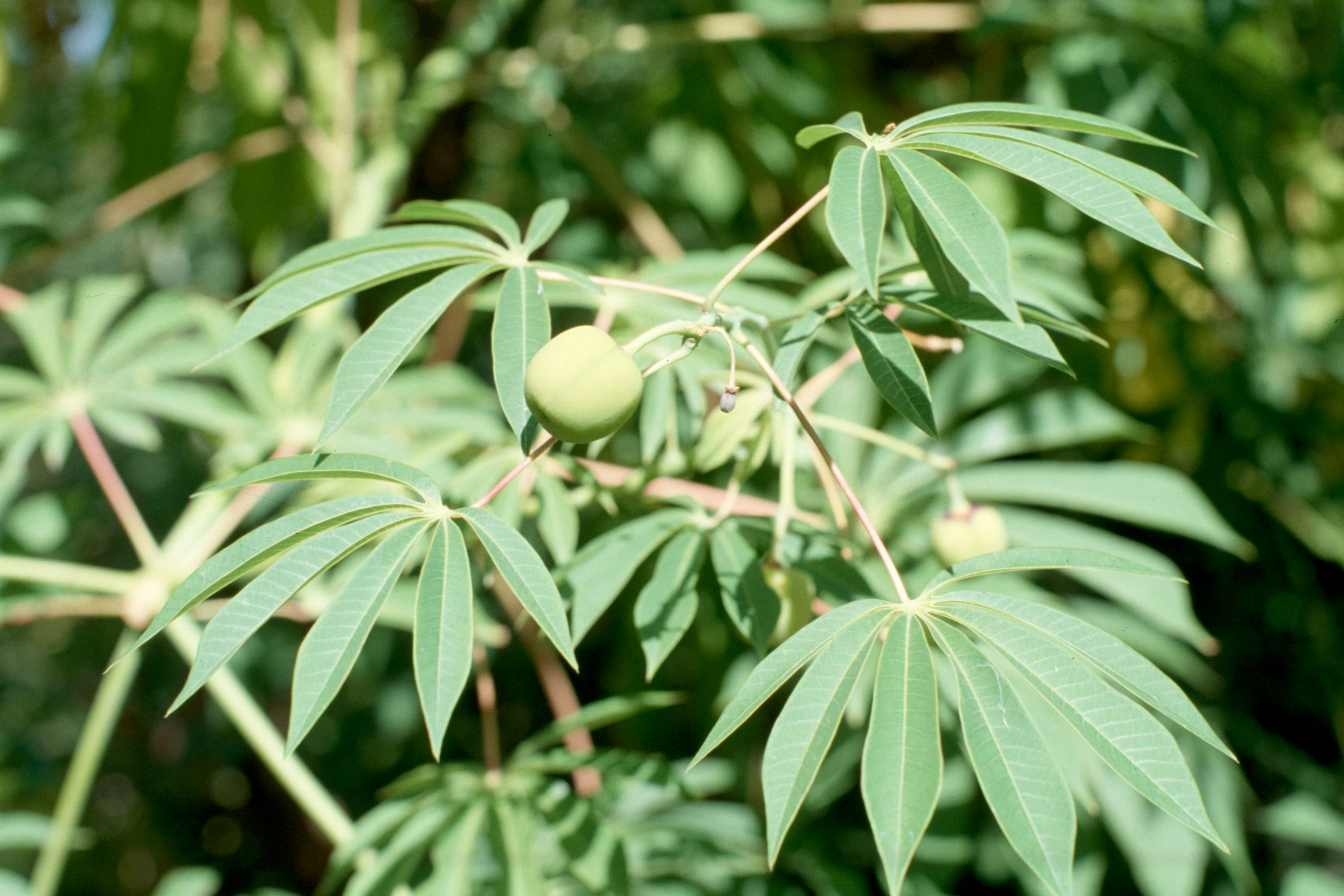 Manihot palmata. Real Jardín Botánico, Madrid.